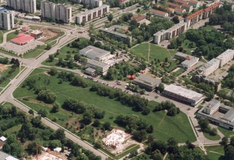 Kazincbarcika, Hungary, aerialphotography